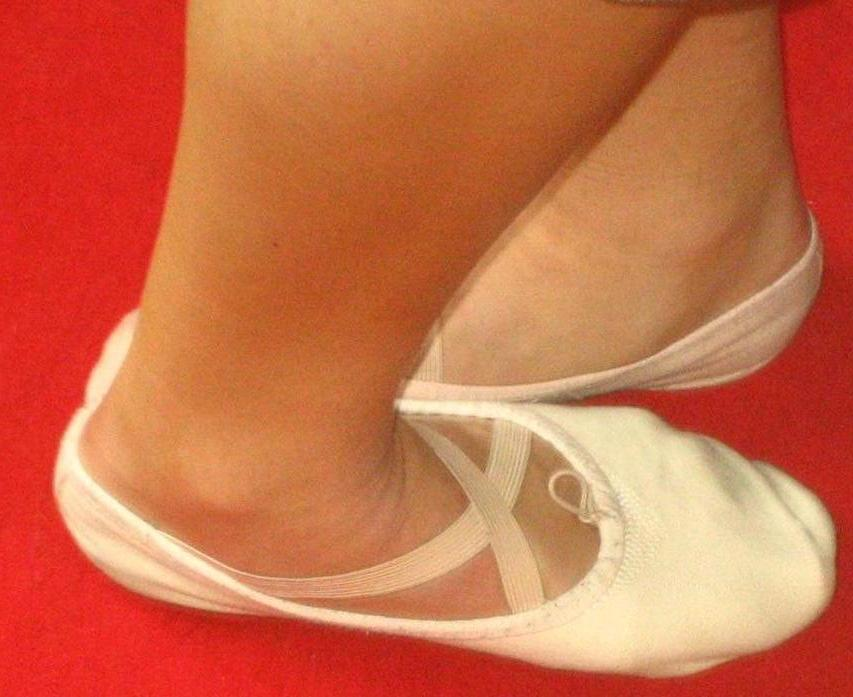 Ballett 5. position